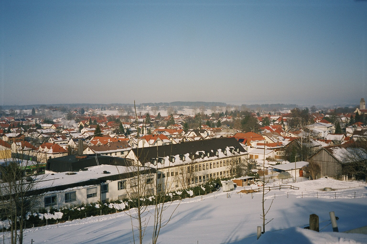 Blick auf Peißenberg Dorf im Winter vom Guggenberg]